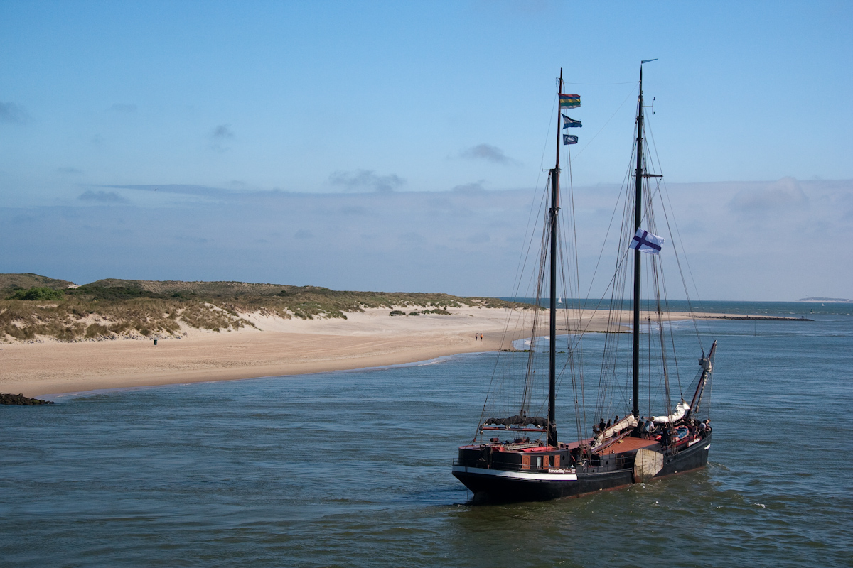 Sailboat, Vlieland